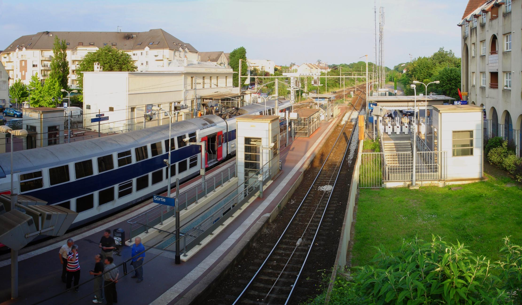 Gare de Montigny - Beauchamp à Montigny-lès-Cormeilles et Beauchamp (Val-d'Oise)